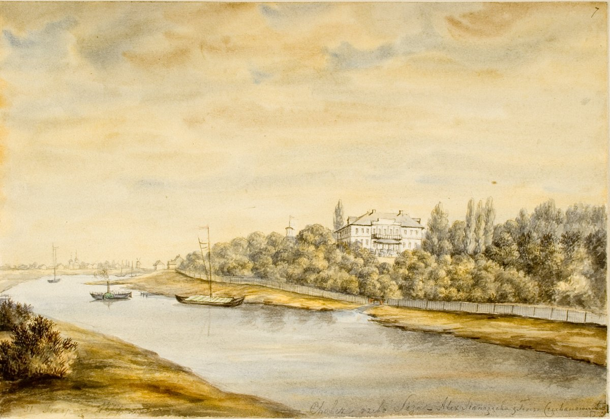 Беларуская (тарашкевіца): Хальч (Chalč), сядзіба Халецкіх (Chalecki)